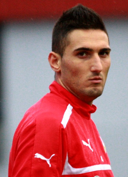 Federico Macheda, ausgeliehen von ManU, beim VfB-Training. Aufgenommen von